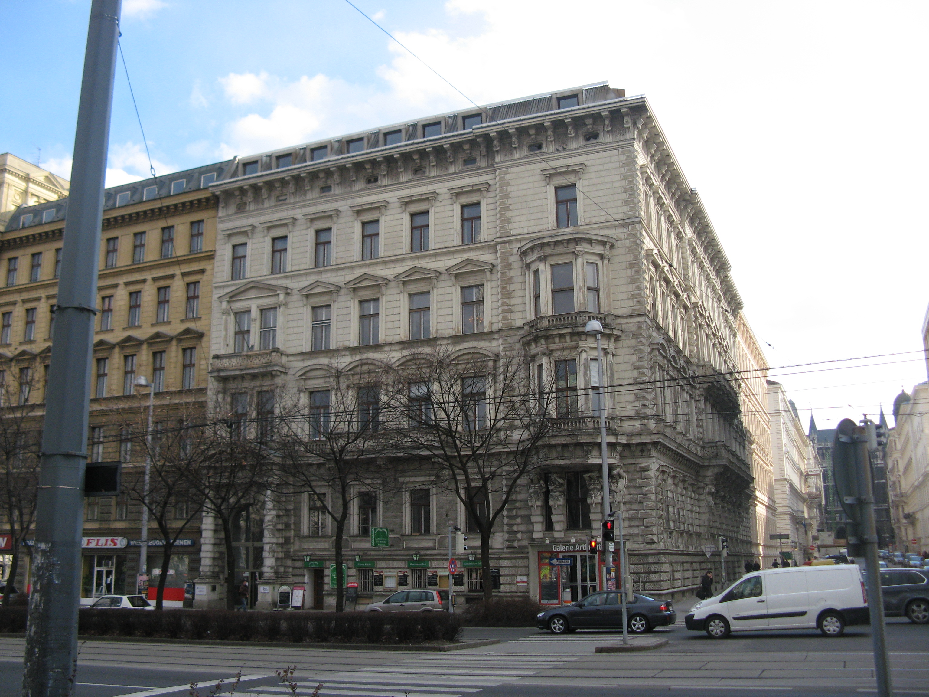 Ehemaliges Haus Reitzes (1878-79) von Wilhelm Fraenkel, Universitätsstraße 5 / Ebendorferstraße 14, Wien-Innere Stadt